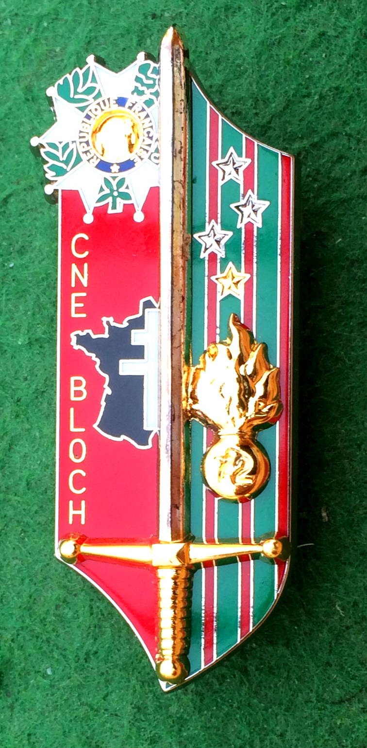 Insigne de la promotion du bataillon EOR de l'ESM Saint-Cyr Coëtquidan «Capitaine Bloch» (1995). La croix de Lorraine sur fond de la France couleur noire indique qu'il est mort au titre de la Résistance. A gauche, la Légion d'honneur et à droite le fond est aux couleurs de la médaille militaire au titre des deux guerres, avec 4 citations à l'ordre de l'Armée et lors de la seconde guerre, une à l'ordre du corps d'Armée. L'épée pour l'école d'officier (J. Balme - Saumur).